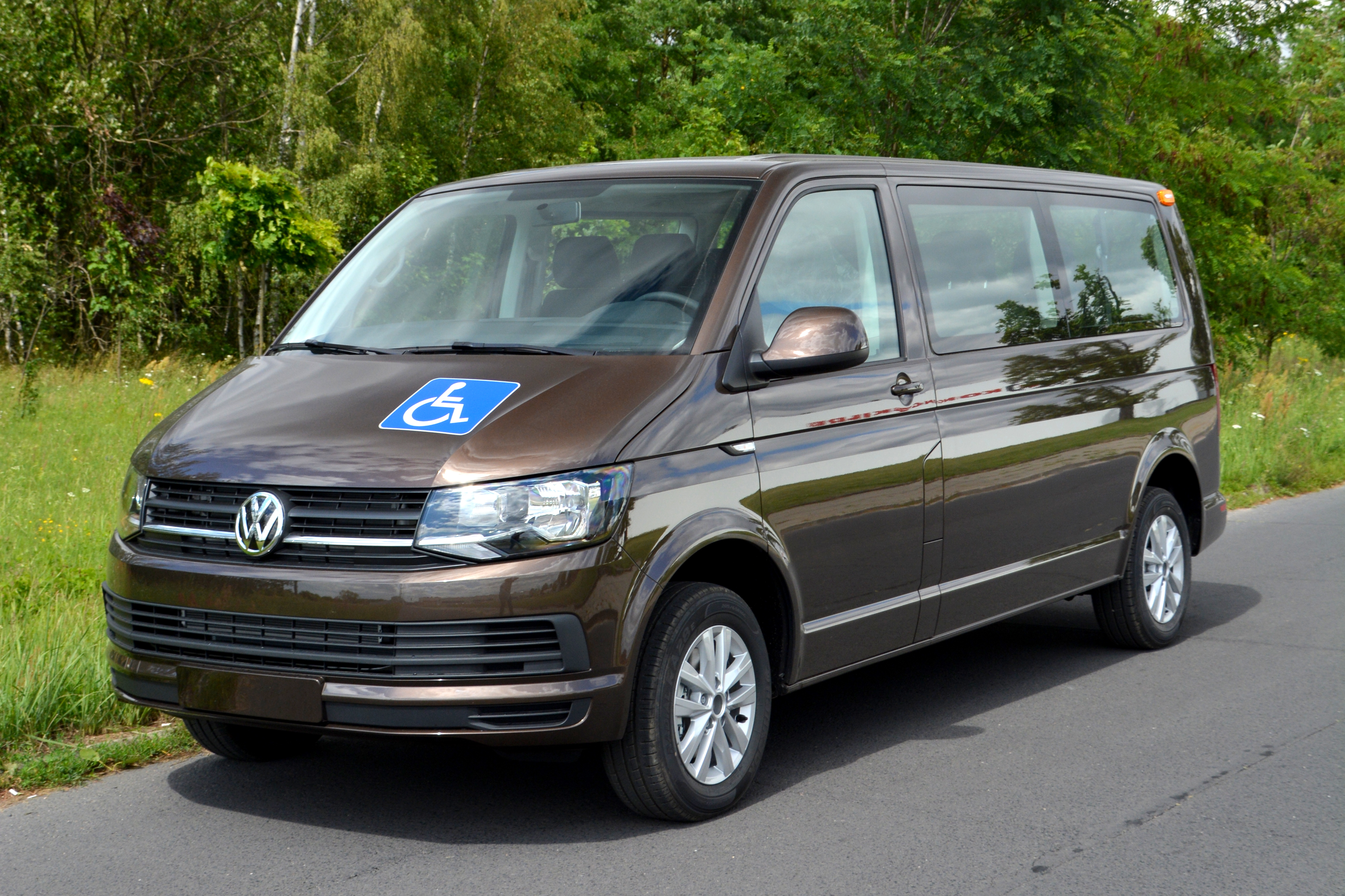 Volkswagen Transporter T6 przystosowany do przewozu osób niepełnosprawnych przygotowany przez AMZ Kutno